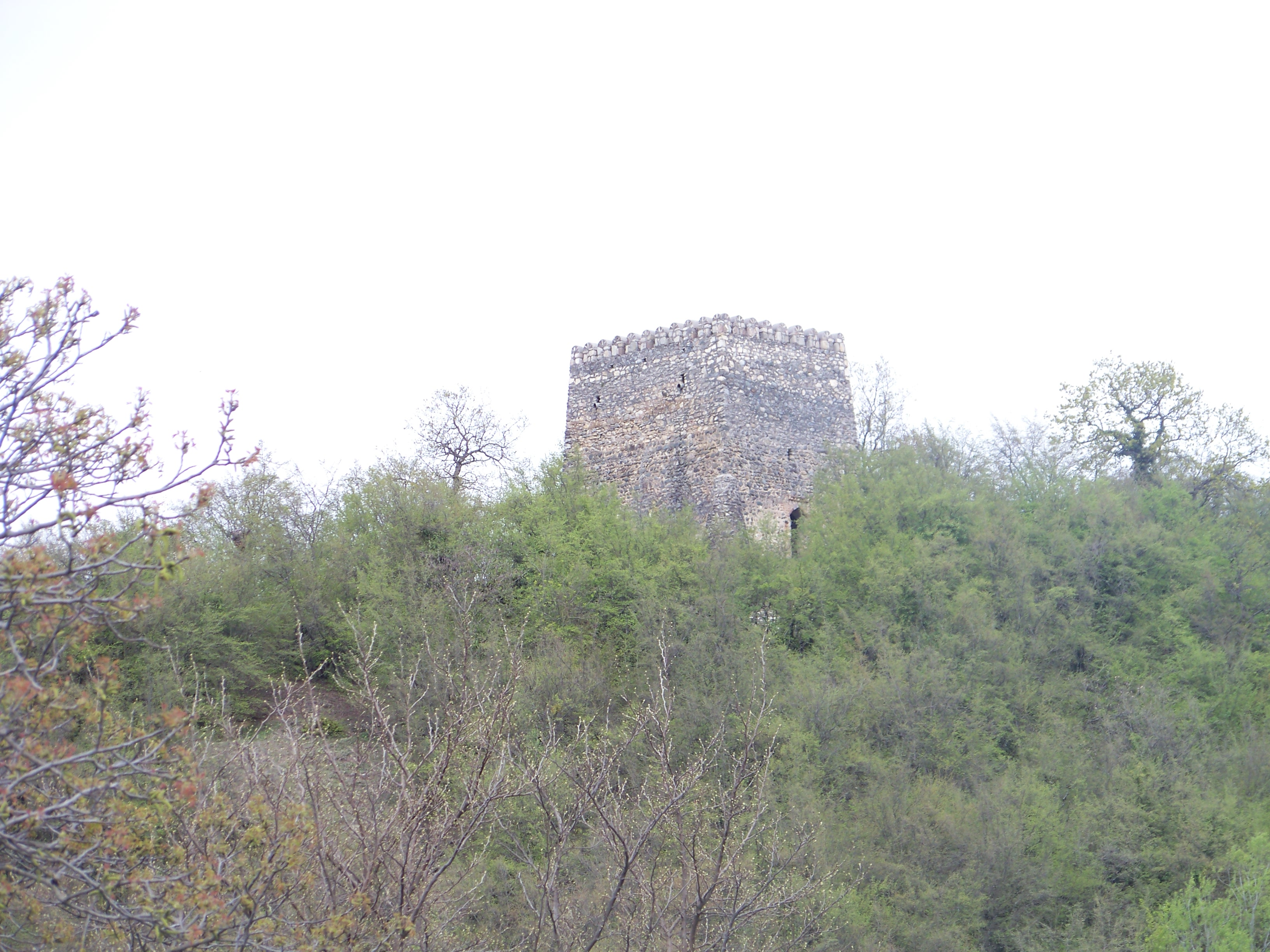 ლალისყურის ციხე